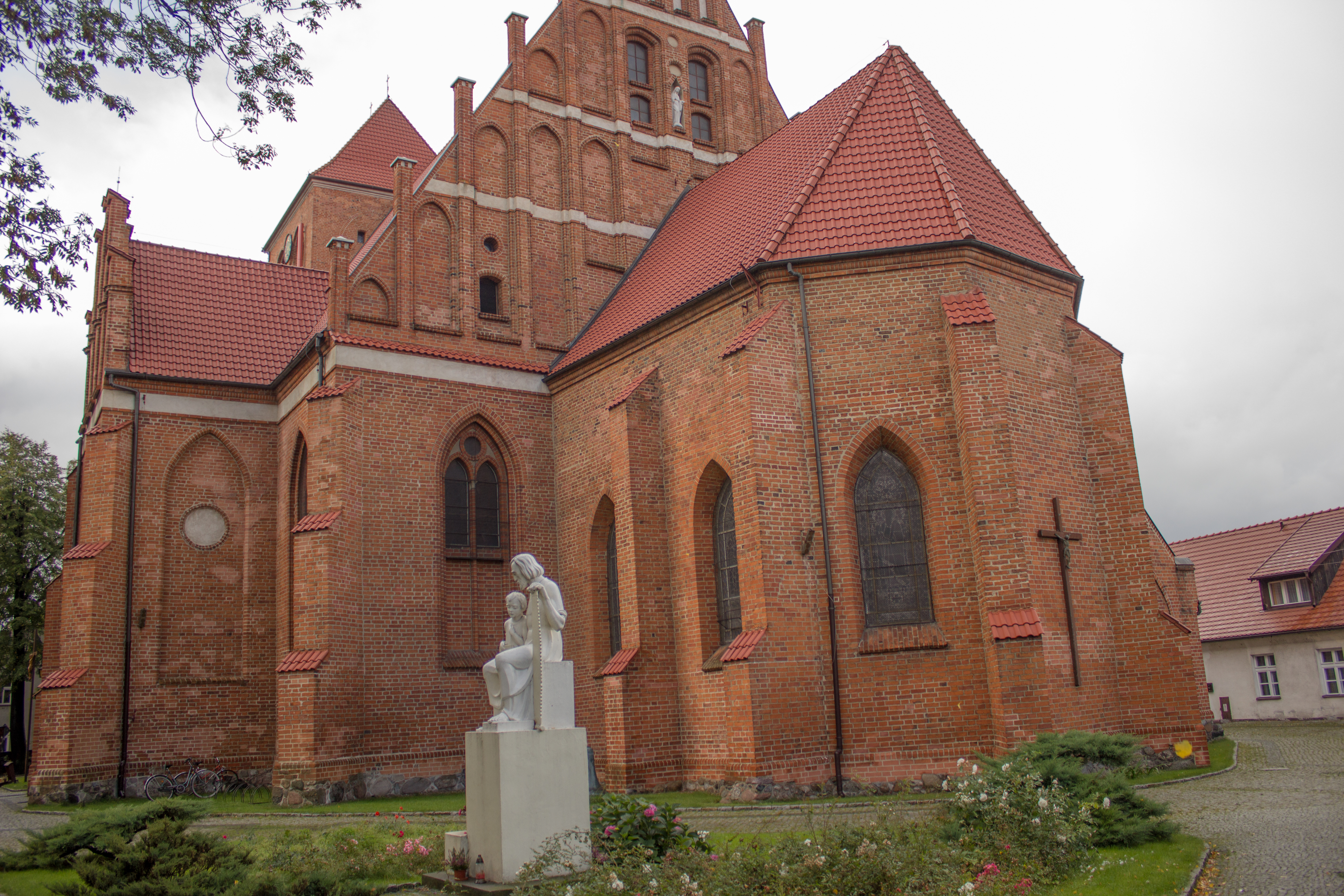 kościół parafialny p.w. Św.Apostołów Piotra i Pawła Puck, Puck